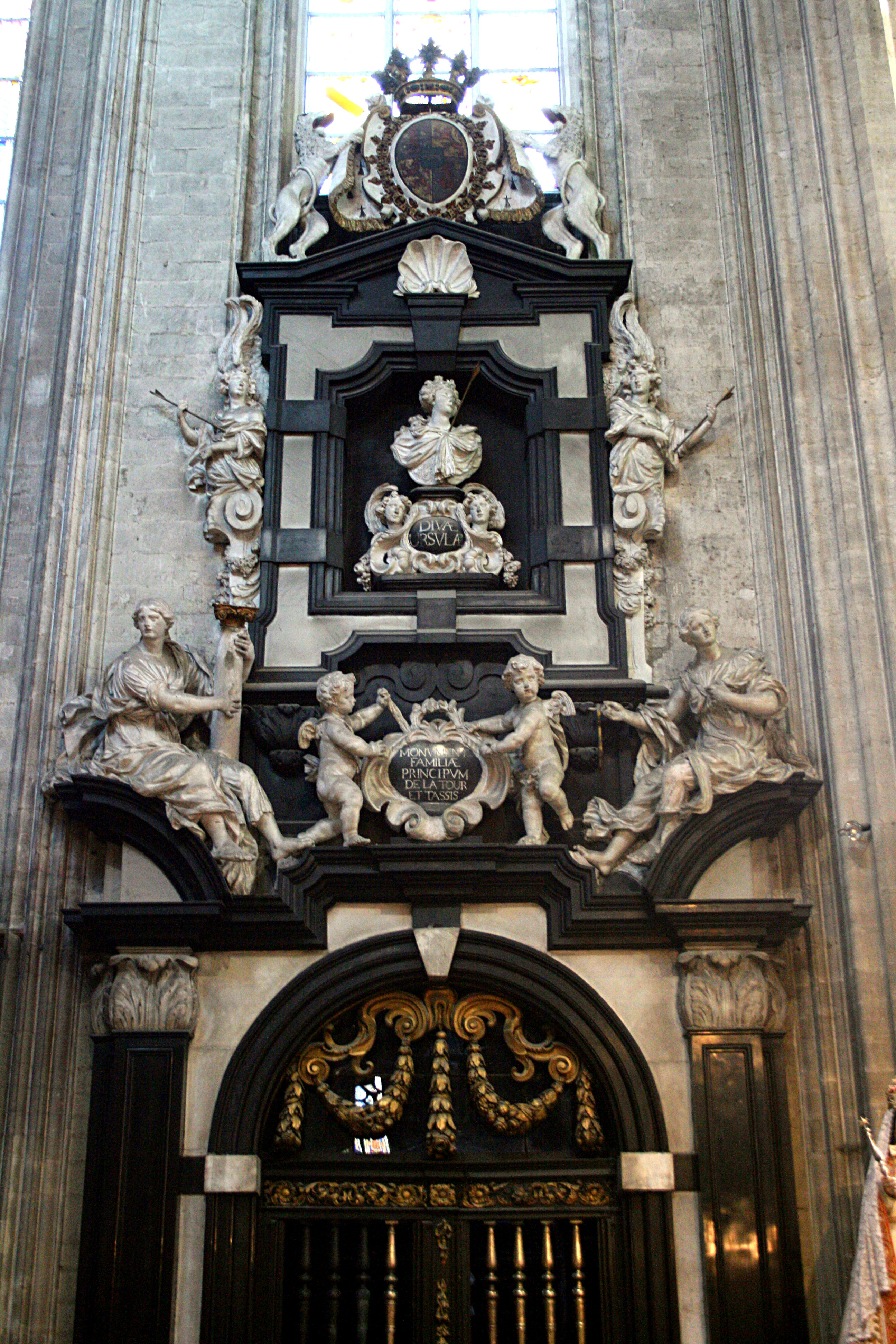 Eglise Notre-Dame du Sablon, Bruxelles (Belgique). Portail de la chapelle Sainte-Ursule (1651-1676). Statues de Grupello